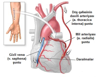 Üç növ aorta koronar şuntlama (sxematik): vena (v. saphena), mil arteriyası (a. radialis), döş qəfəsinin daxili arteriyası (a thoracica interna) vasitəsi ilə.